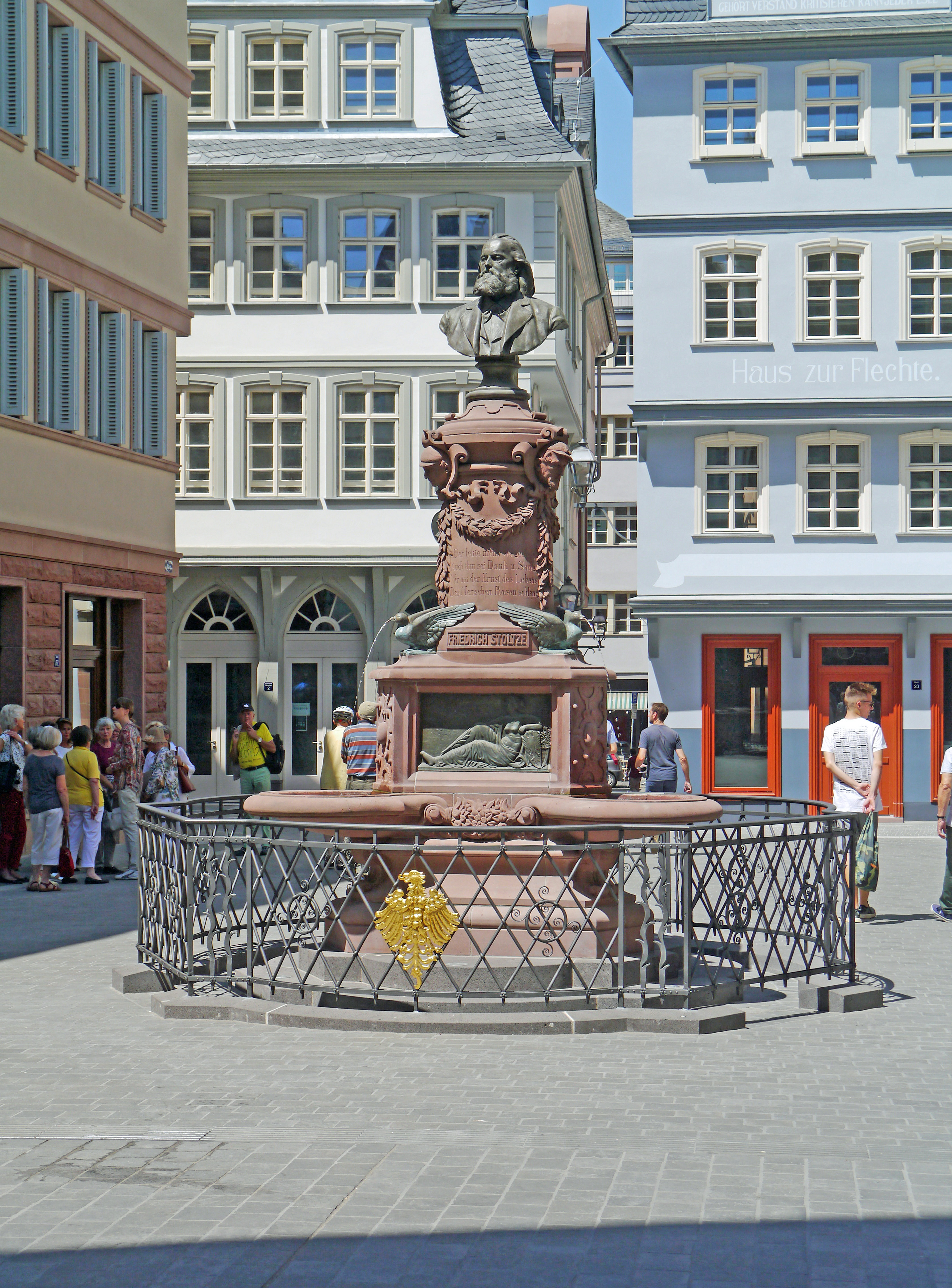 Blick vom Markt auf den Stoltze-Brunnen (20.06.2018).